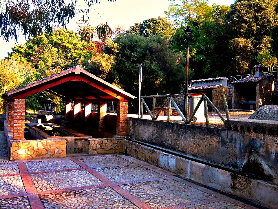 Les dones rentaven la roba en el Safareig.